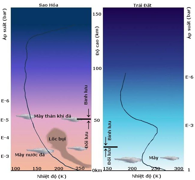 Trần Thế Trung vẽ hình này cho Wikipedia Tiếng Việt